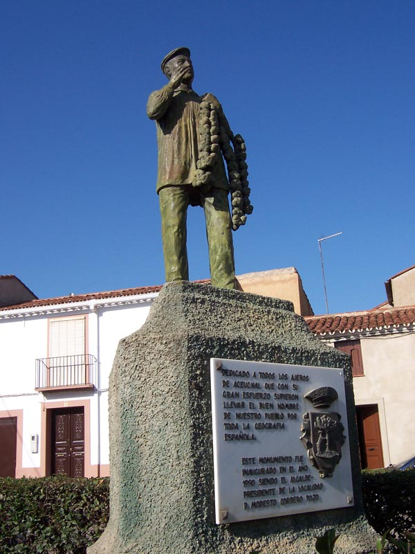 Estatua dedicada al "Ajero"